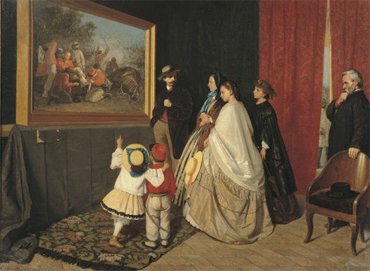 "Le impressioni di un quadro", olio su tela, 71 x 97 cm, collezione privata